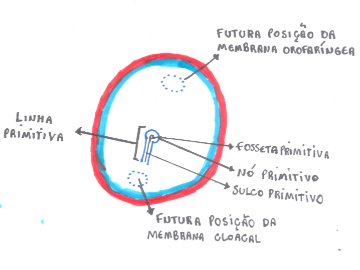 Esquema da superfície do disco embrionário bilaminar. A linha primitiva e as futuras posições das membranas orofaríngea e cloacal estão indicadas